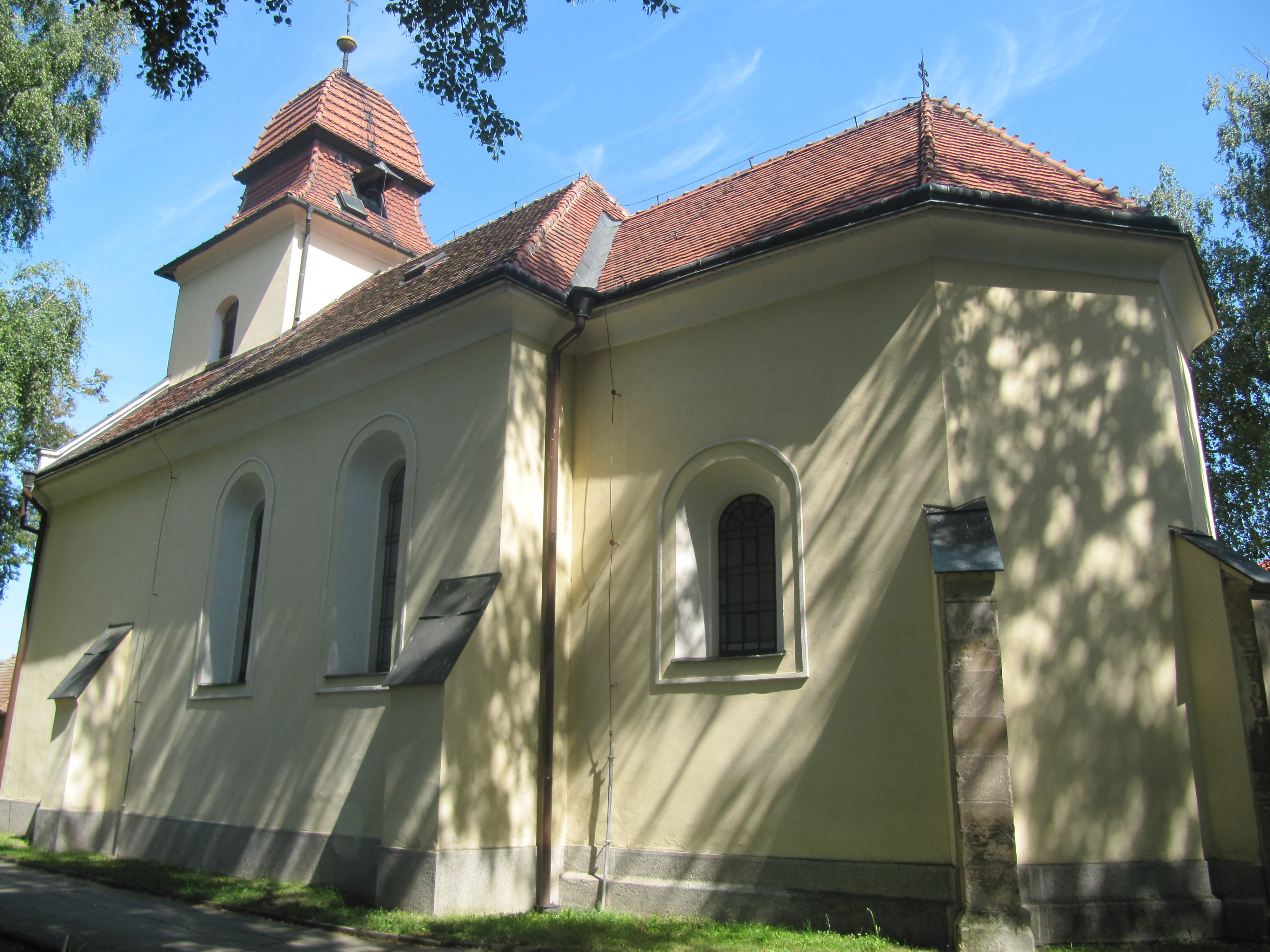 Žalkovice, okres Kroměříž, Česká republika. Kostel svatého Mikuláše.